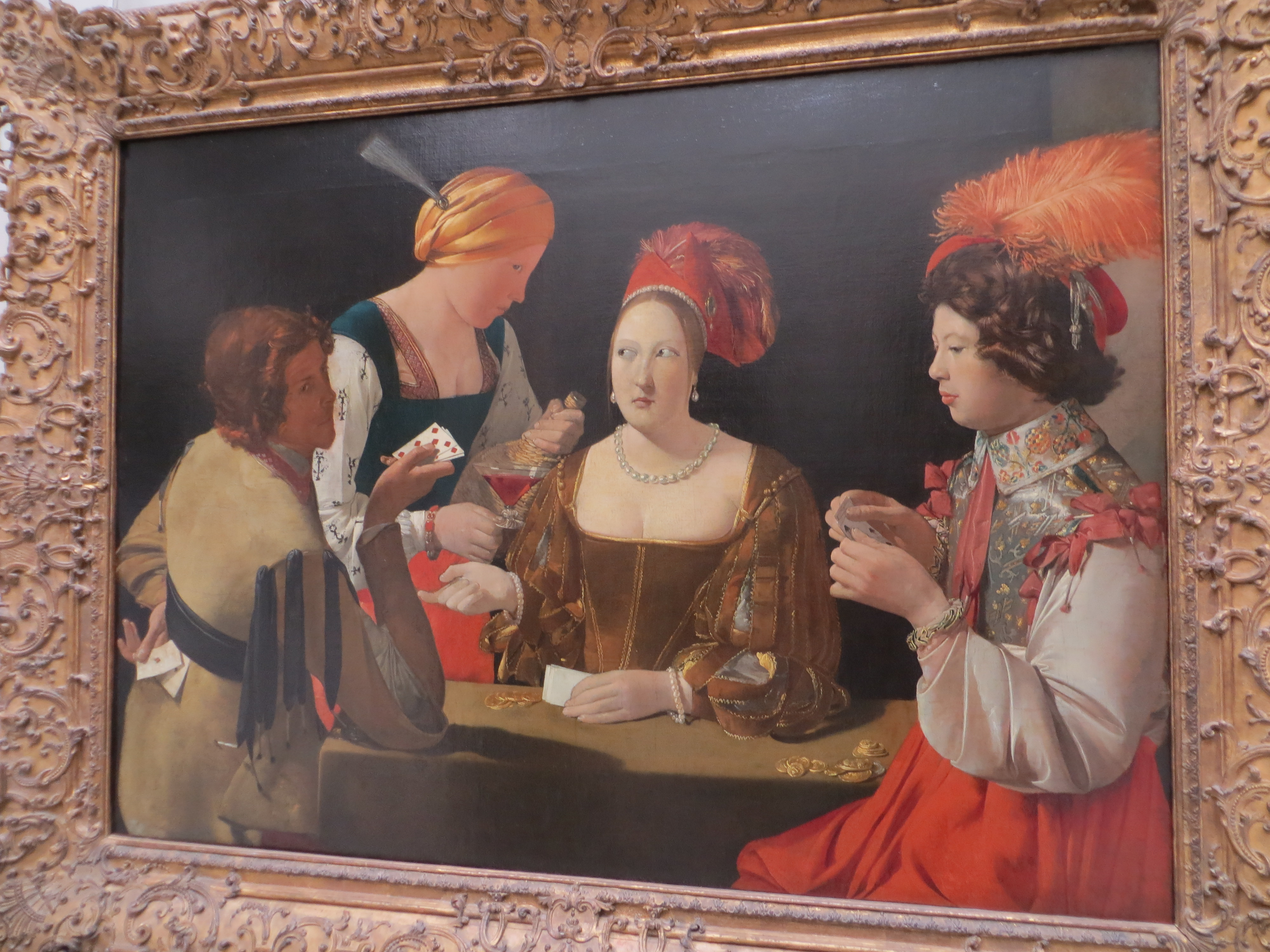 Georges de La Tour Le Tricheur a l'as de carreau in situ au musée du Louvre